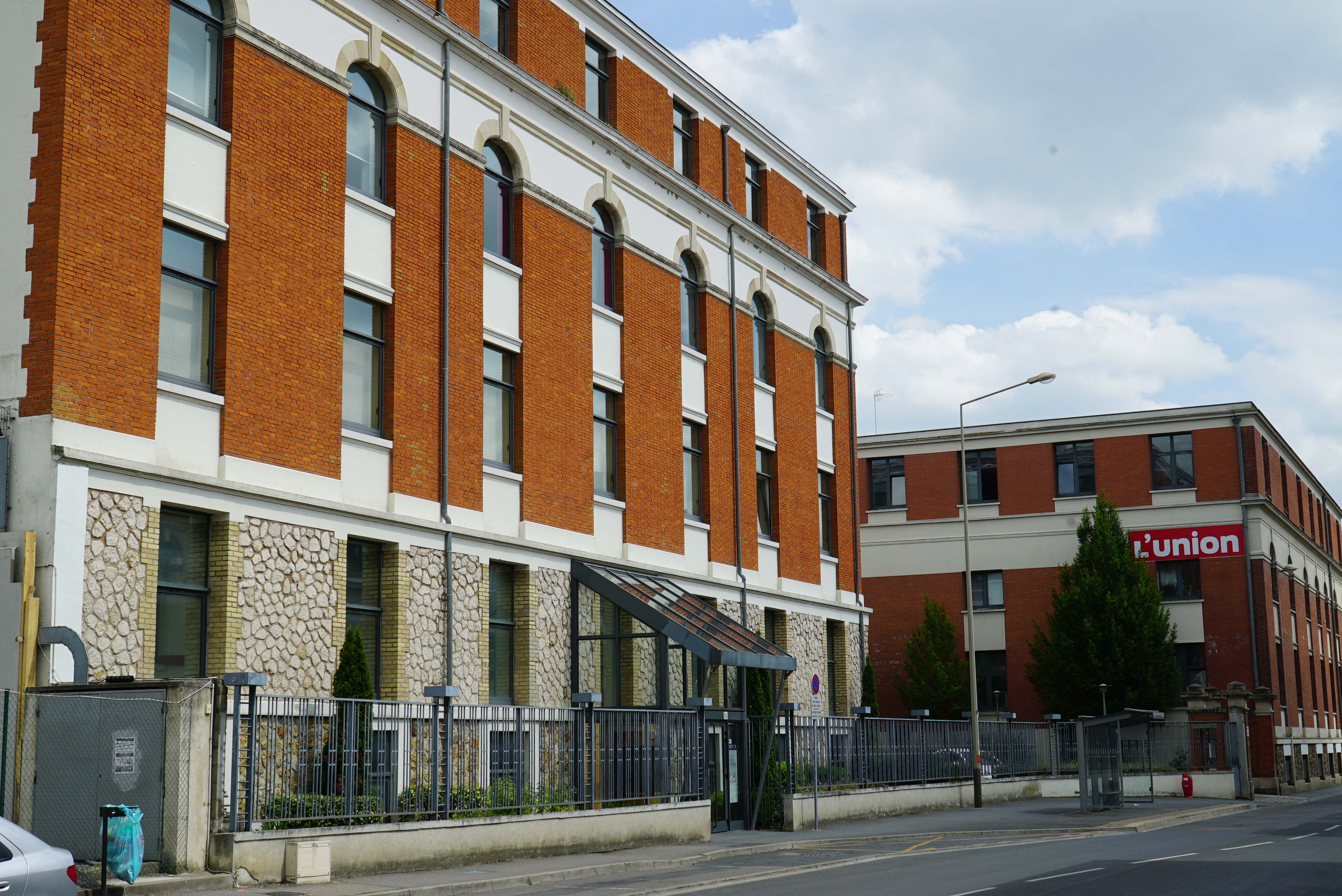 vue de la rue de Courcelles.